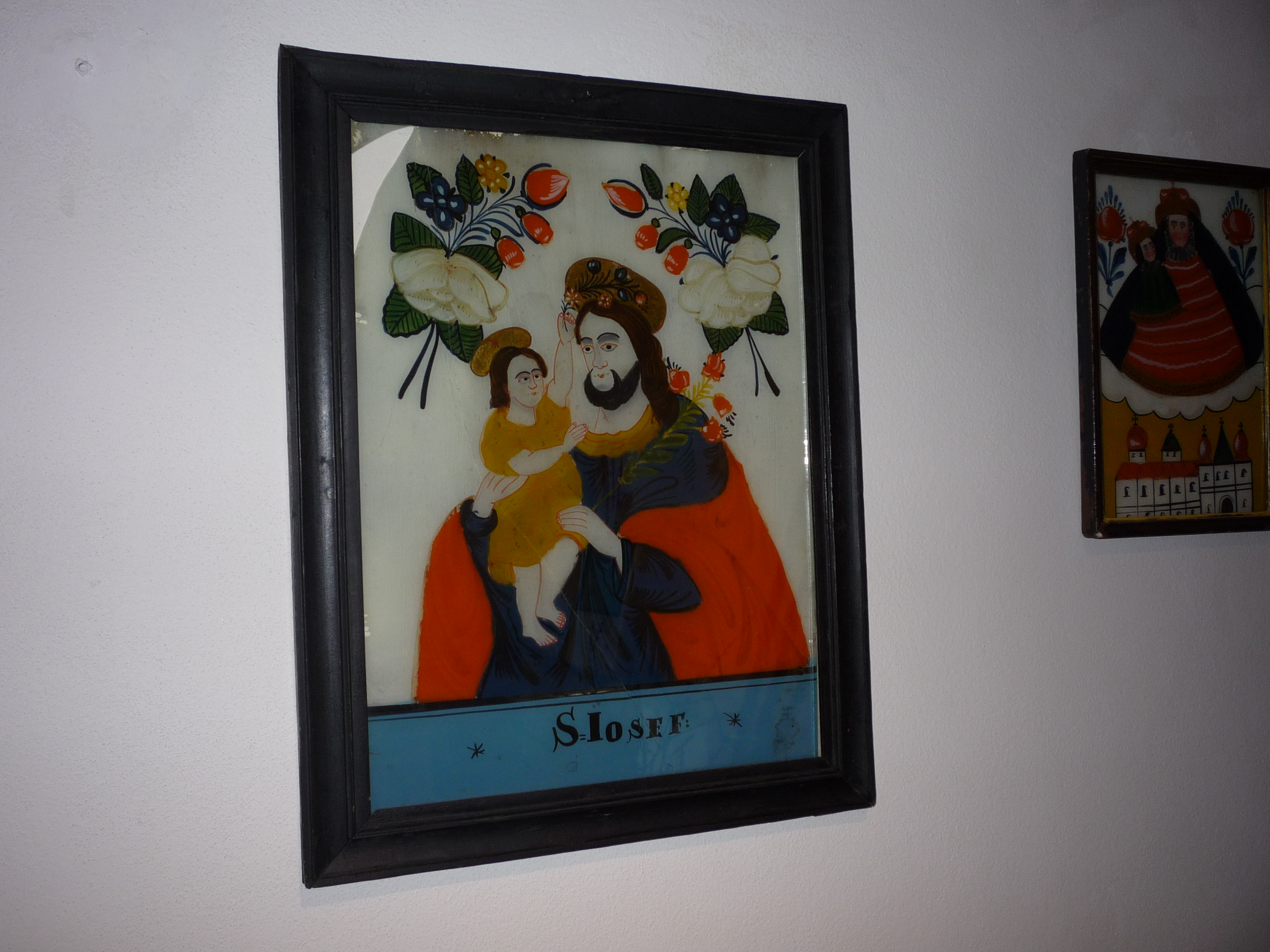 Autor fotografie Jiří Zelenka. Velikonoce na Vysočině. 18. - 19.století. V domě Karla Havlíčka Borovského.